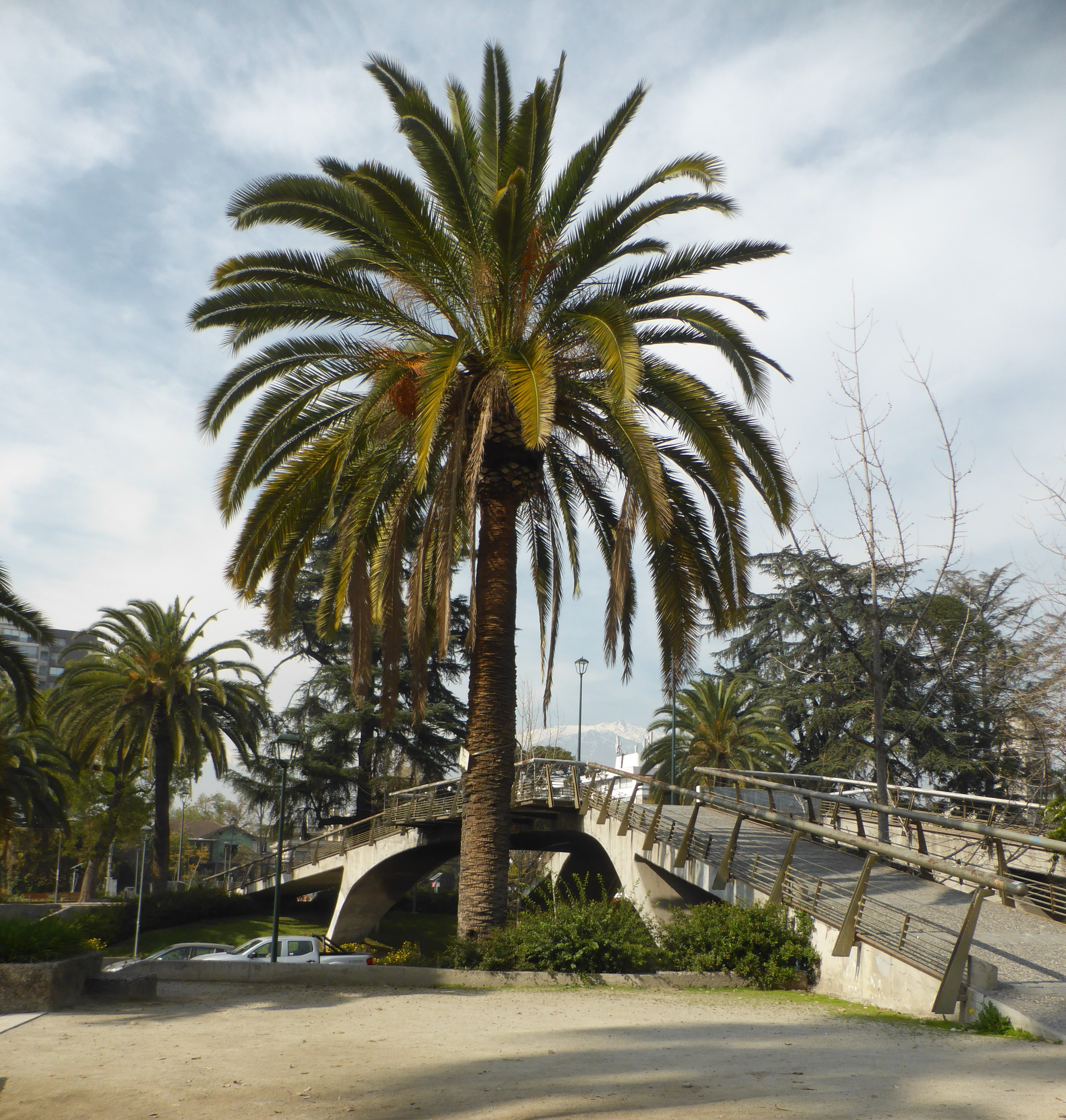 En el parque o Plaza Pedro de Valdivia, en Providencia (Región Metropolitana), Santiago de Chile, hay tres palmeras canarias identificadas con carteles, junto a la pasarela peatonal sobre la avenida Pedro de Valdivia. En esos rótulos o carteles se lee: "Palmera de 100 años. PALMERA (Nombre común). Phoenix canariensis (Nombre científico). Municipalidad de Providencia, 1980." Estas palmeras son muy comunes en Chile. Pero son originarias de las Islas Canarias. Debieron llegar a Chile hace varios siglos. En época de la colonia, los barcos recalaban en Canarias, antes de cruzar el océano Atlántico.